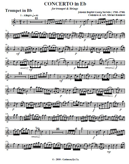 partition de neruda